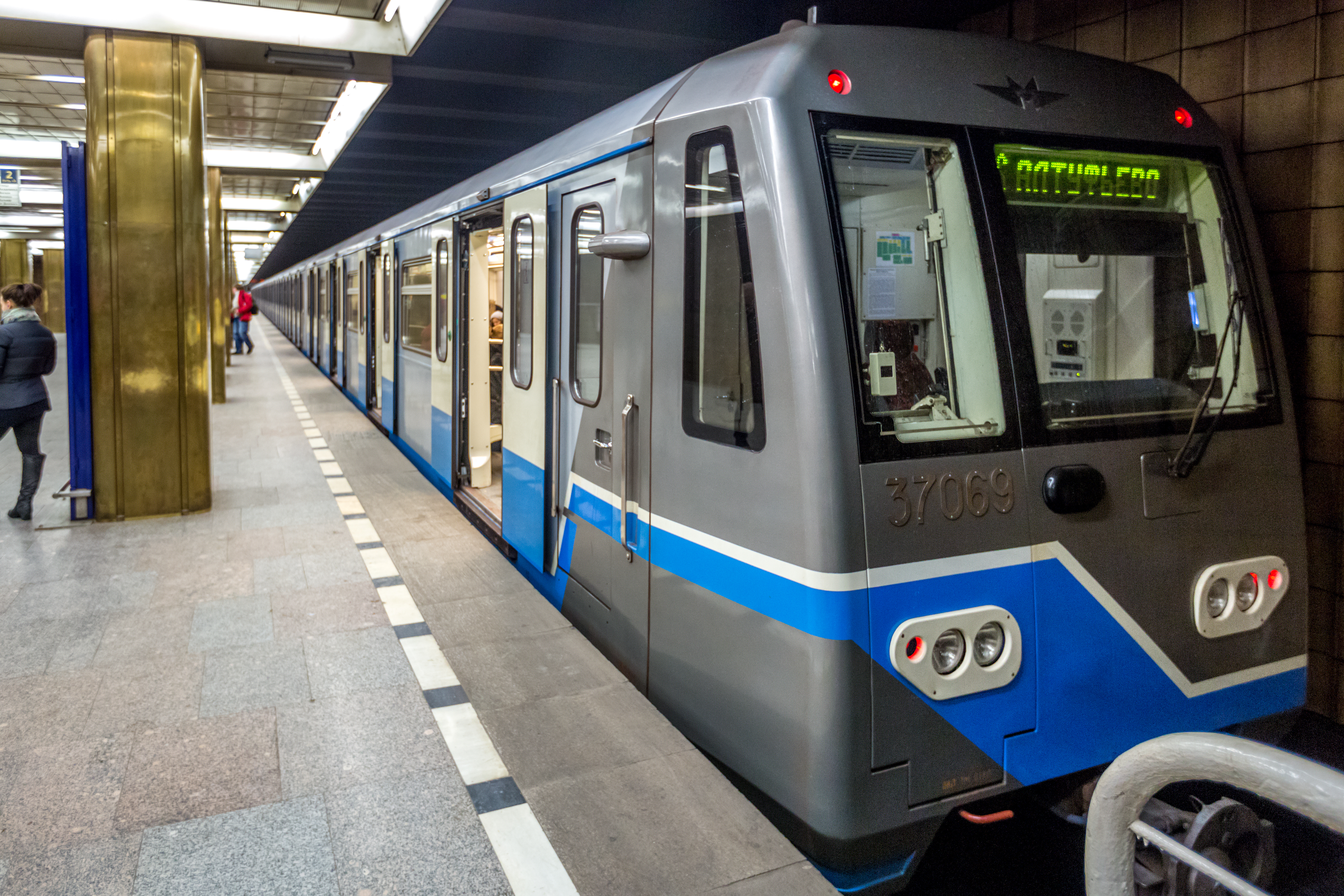 Пражская (станция метро)